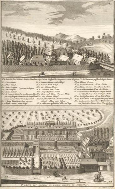 Ansicht der Schloss- und Gartenanlagen in Schwöbber. Aus: „Nürnberger Hesperiden“, Johann Christoph Volkamer, 1714